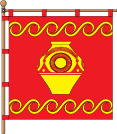 Прапор Колибаївської територіальної громади